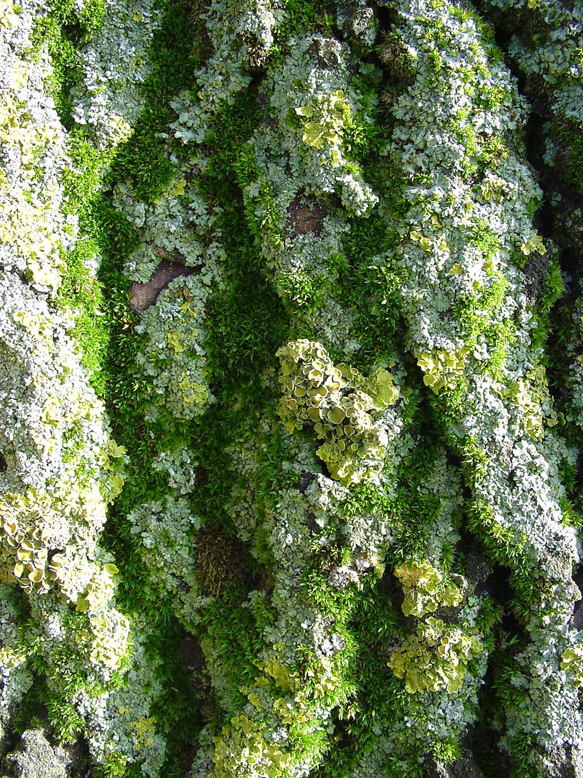 Tronc de peuplier couvert de mousses et lichens, Plaine de l'arrageois (Département du Pas de Calais, Nord de la France).